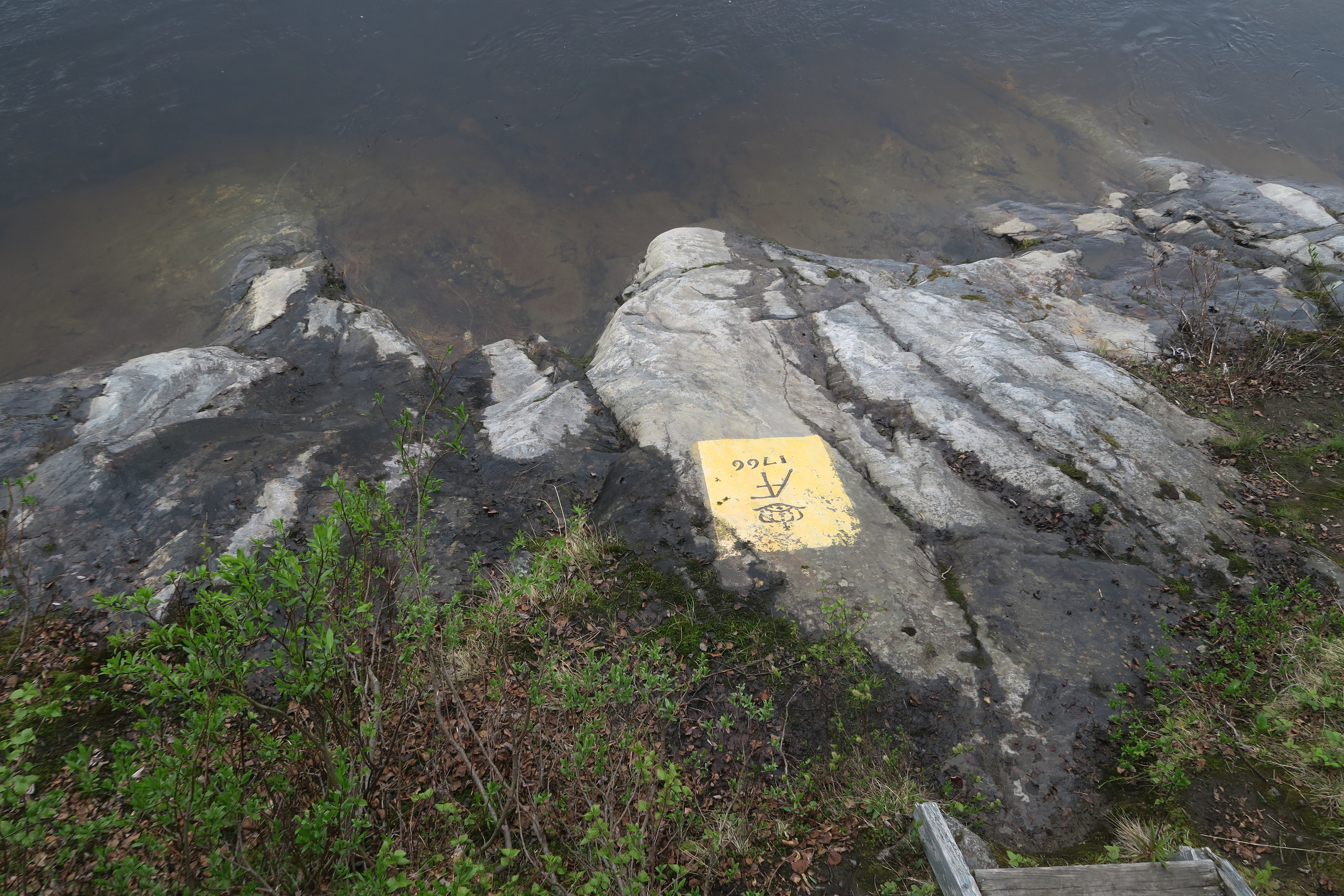 Strömstadin rauhan rajakivet, Vetsikko, Utsjoki, Tenojoen varsi Davvisámegiella: Gonagasgeadgi, Veahcat